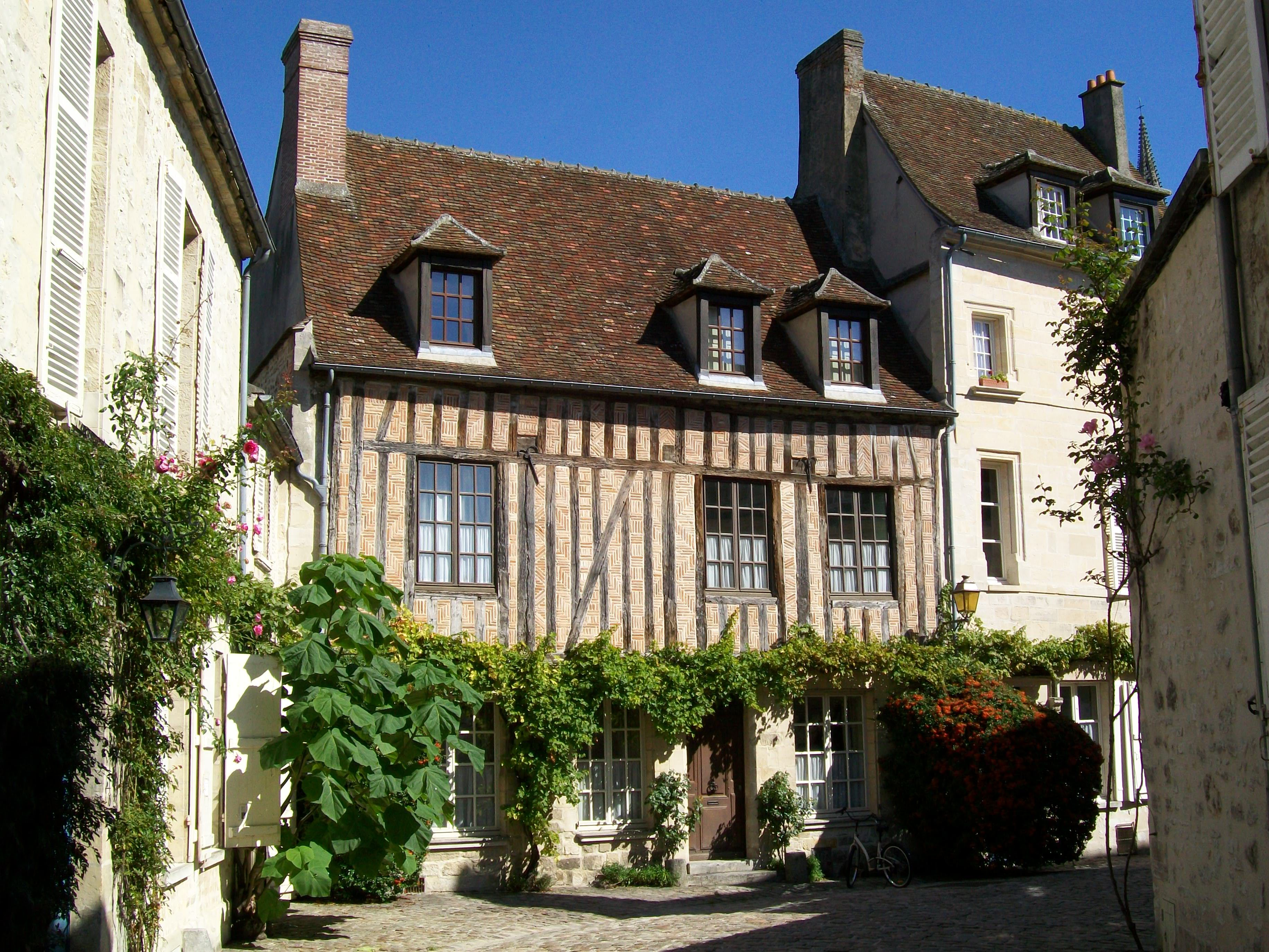 L'hôtel Séguin, maison à colombages rue de la Treille, restaurée en 2002.